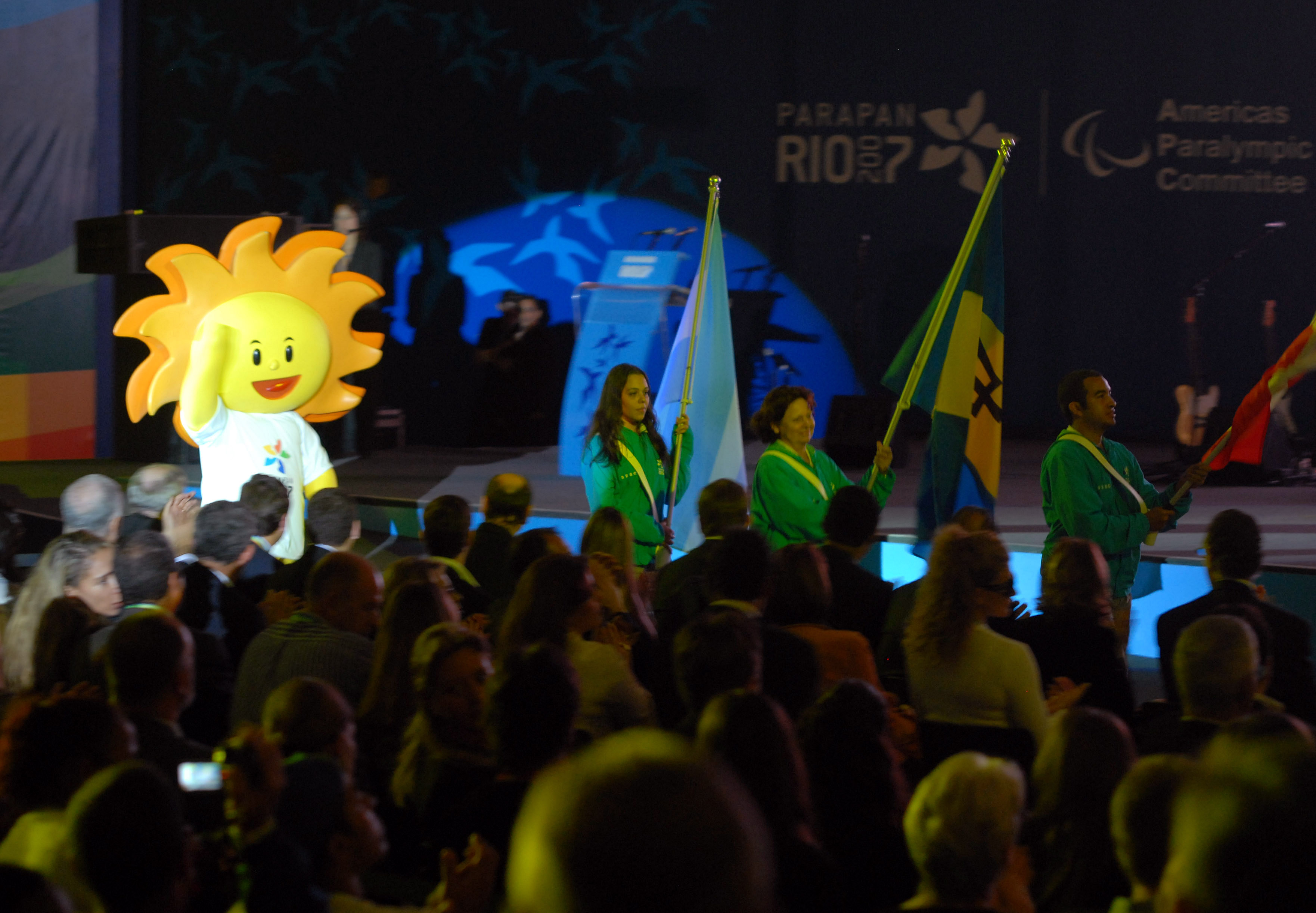 Rio de Janeiro - Cerimônia de encerramento dos Jogos Parapan-Americanos Rio 2007, na Vila Parapan-Americana, em momento de confraternização para os 1.300 atletas e oficiais das 25 delegações participantes. À esquerda, o mascote da competição